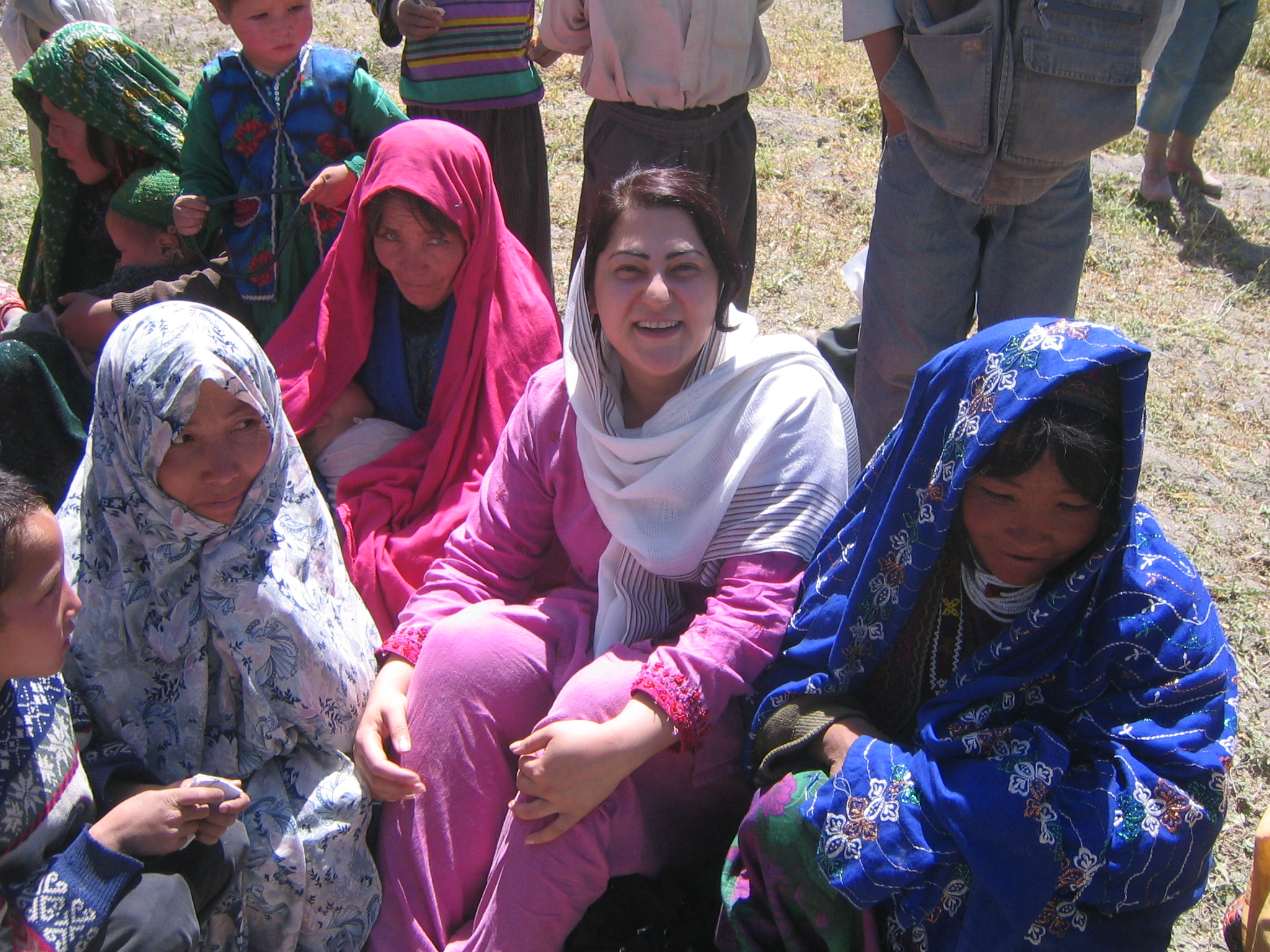 Chékéba Hachemi avec les femmes de Bamyan